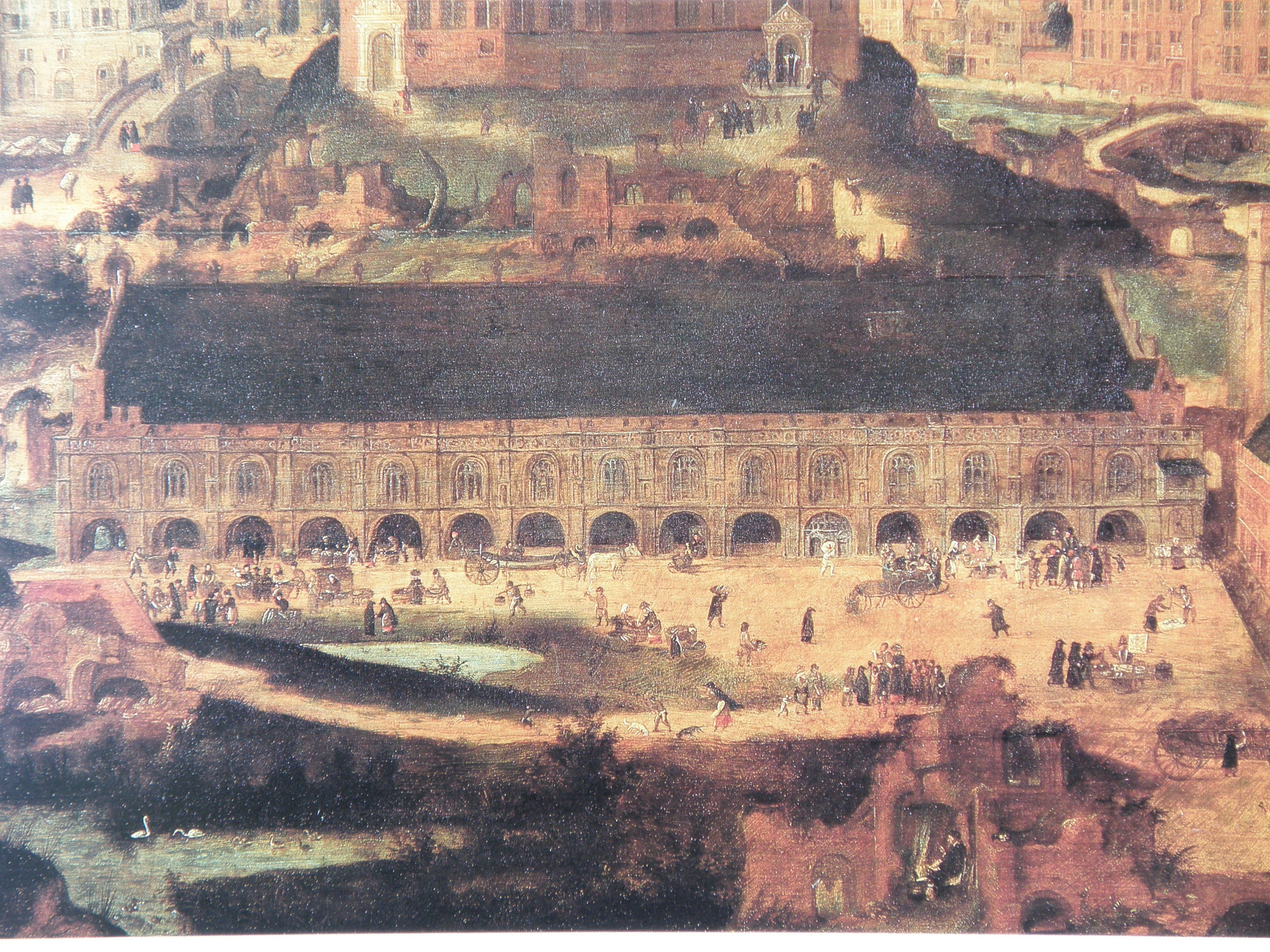 Zeven Wonderen van Brugge, Waterhalle uitvergroot.